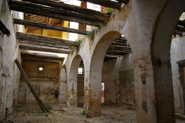 Almacén de la Casa de Arizón en Sanlúcar de Barrameda